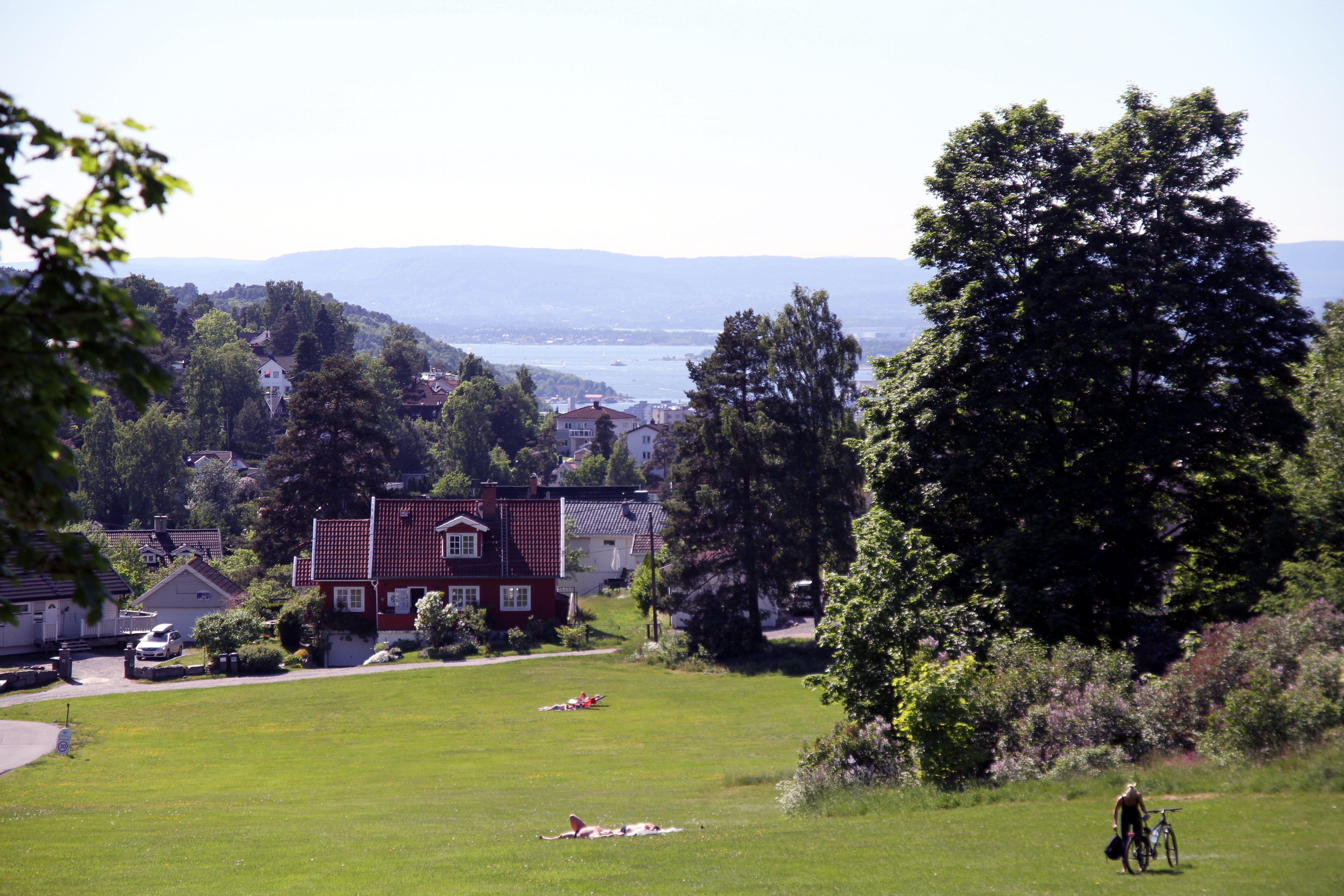 Utsikt fra Nordre Skøyen hovedgård, ned i retning Oslo sentrum.